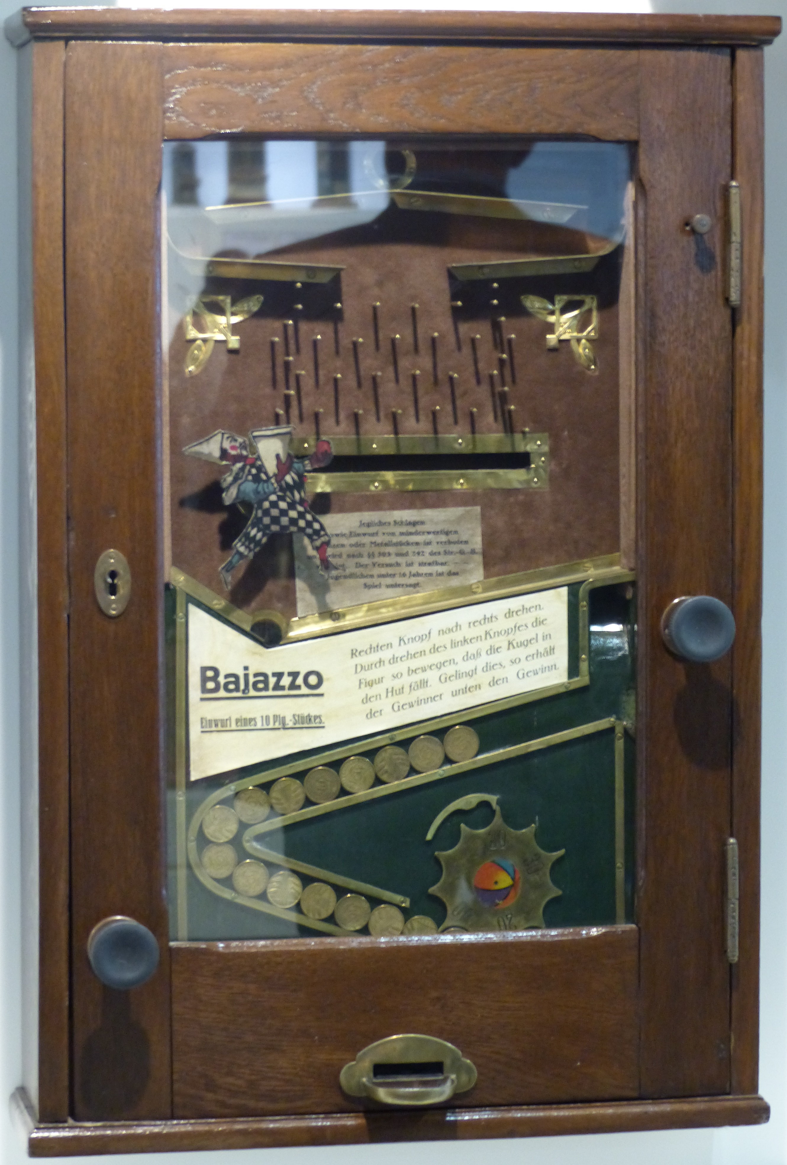 Bajazzo Automat